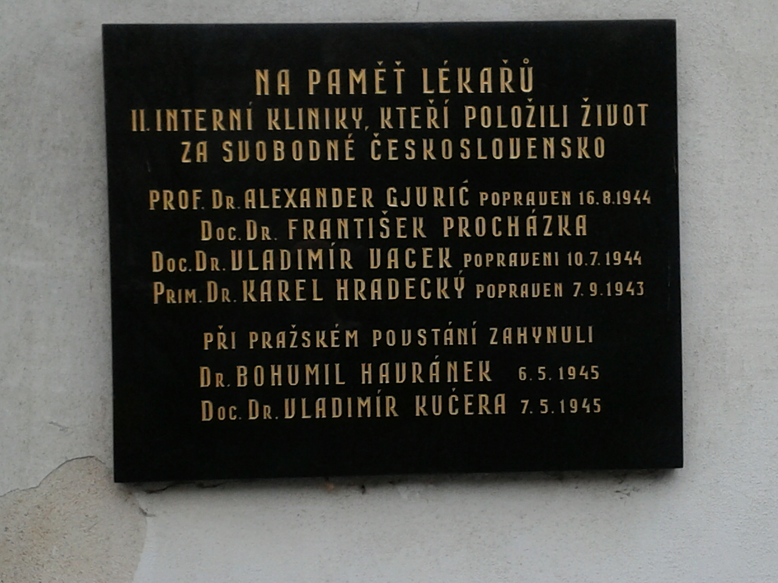 Jméno primáře MUDr. Karla Hradeckého (* 1904 – 1943) (spolu s dalšími) je uvedeno na pamětní desce věnované památce "Obětí 2. světové války z řad lékařů". Pamětní deska je umístěna v objektu Všeobecné fakultní nemocnice (na adrese: Praha 2, U Nemocnice 499/2, Nové Město) na vnitřní zdi přislušející ke II. interní klinice (na západní straně dvora). Na pamětní desce je nápis: NA PAMĚŤ LÉKAŘŮ / II. INTERNÍ KLINIKY, KTEŘÍ POLOŽILI ŽIVOT / ZA SVOBODNÉ ČESKOSLOVENSKO // PROF. DR. ALEXANDER GJURIČ POPRAVEN 16.8.1944 / DOC. DR. FRANTIŠEK PROCHÁZKA / DOC. DR. VLADIMÍR VACEK, POPRAVENI 10.7.1944 / PRIM. DR. KAREL HRADECKÝ POPRAVEN 7.9.1943 // PŘI PRAŽSKÉM POVSTÁNÍ ZAHYNULI / DR. BOHUMIL HAVRÁNEK 6.5.1945 / DOC. DR. VLADIMÍR KUČERA 7.5.1945